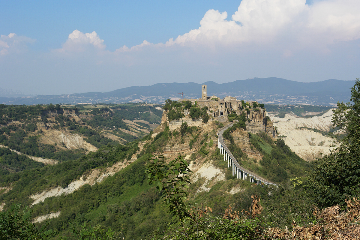 Bagnoreggio, Blick auf die Citta di Bagnoreggio